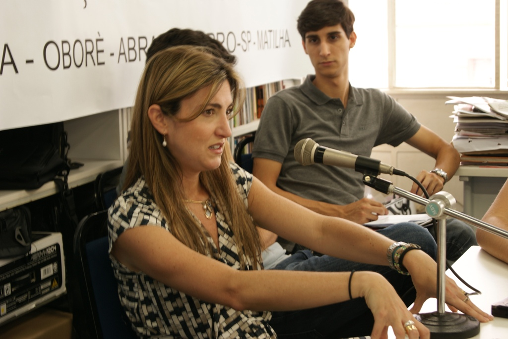 Jornalista brasileira Patrícia Campos Mello, em 2010.